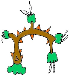 Glifo de Mixquiahuala, Hidalgo